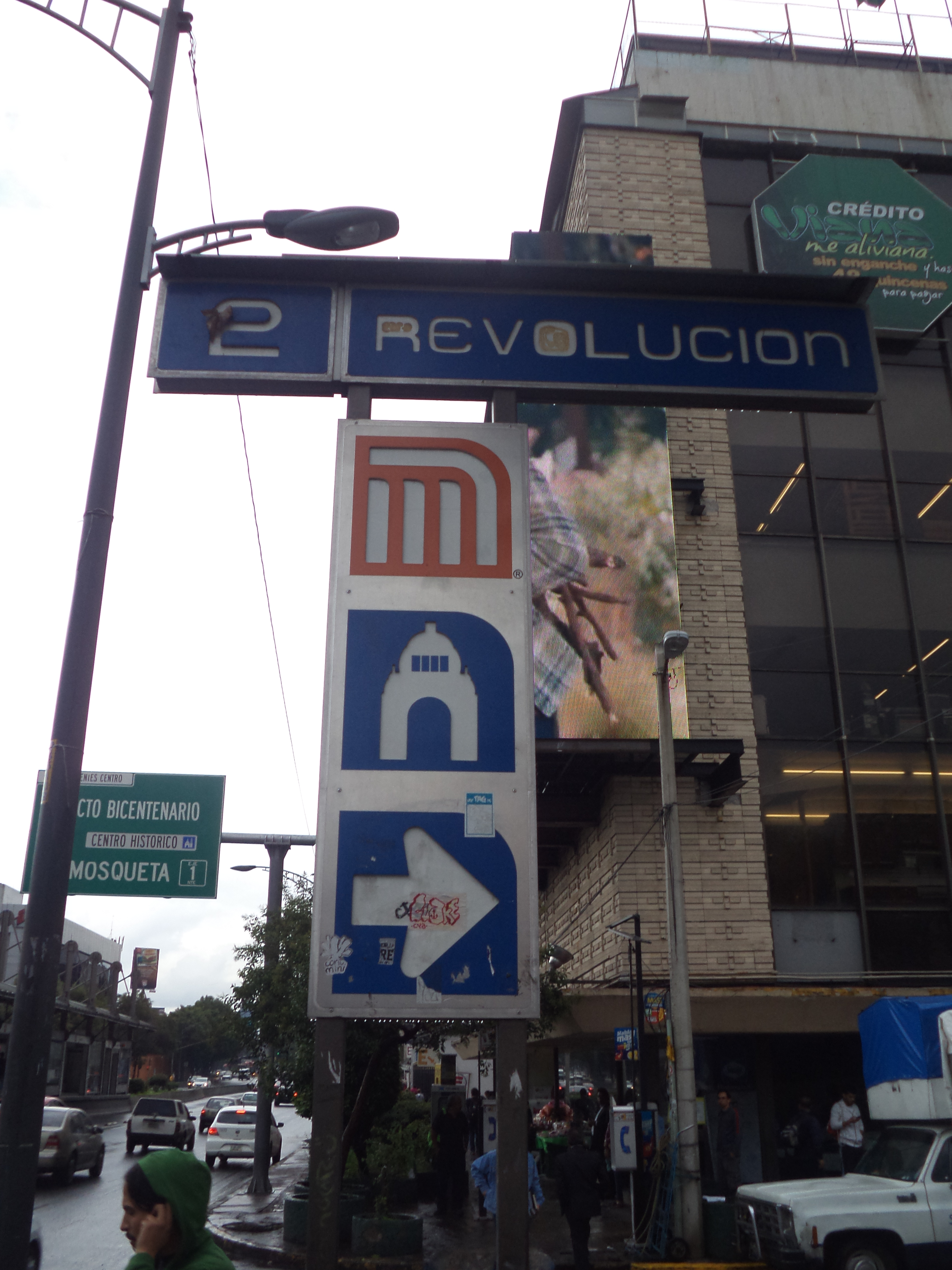 Estela estación Revolución